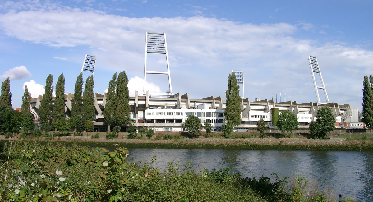 Das Weserstadion in Bremen, Spielstätte des SV Werder Bremen, von Südwesten her gesehen.